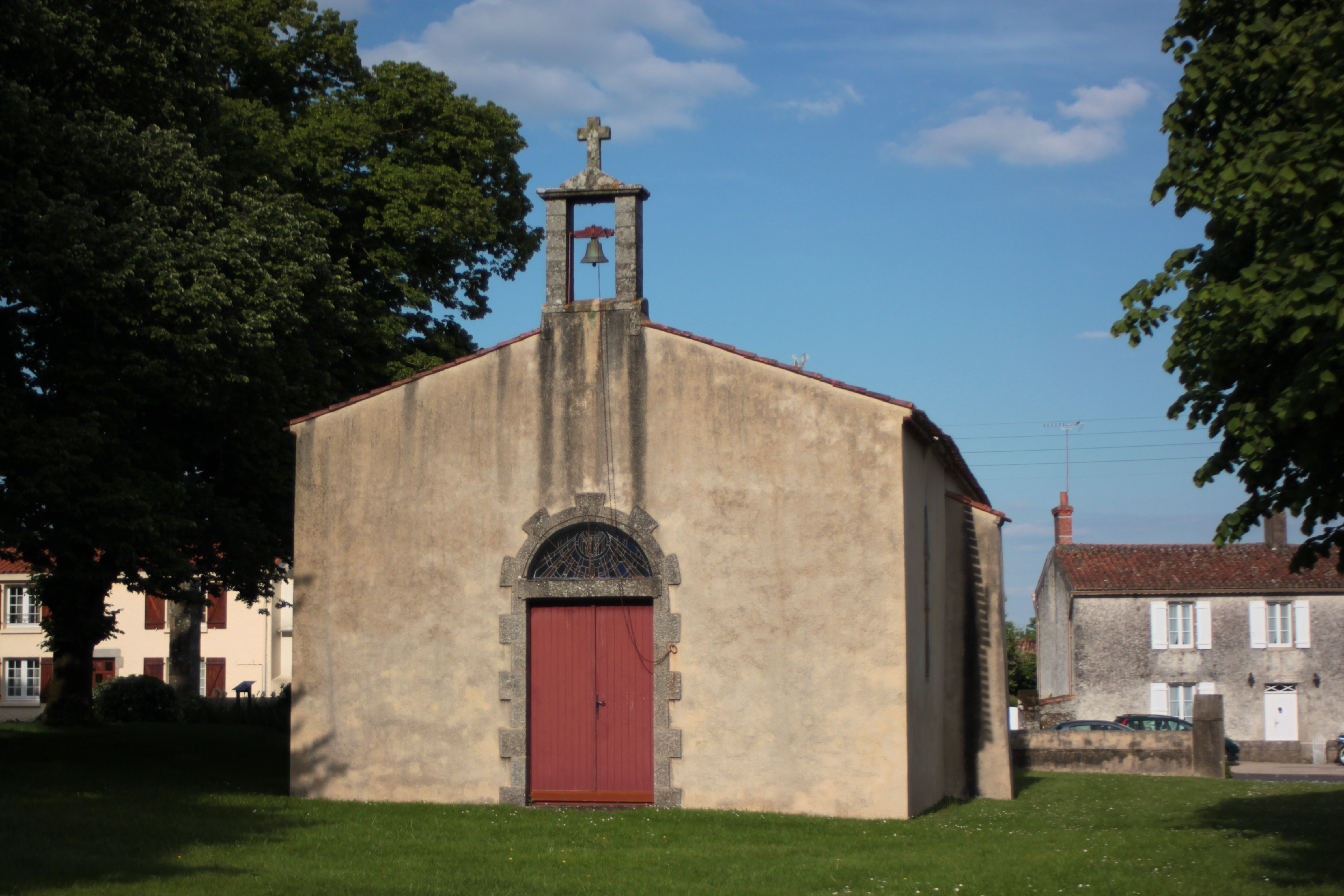 Chapelle Notre-Dame de la Miséricorde (1763-1824-1999), Fr-85-la Chapelle-Palluau.